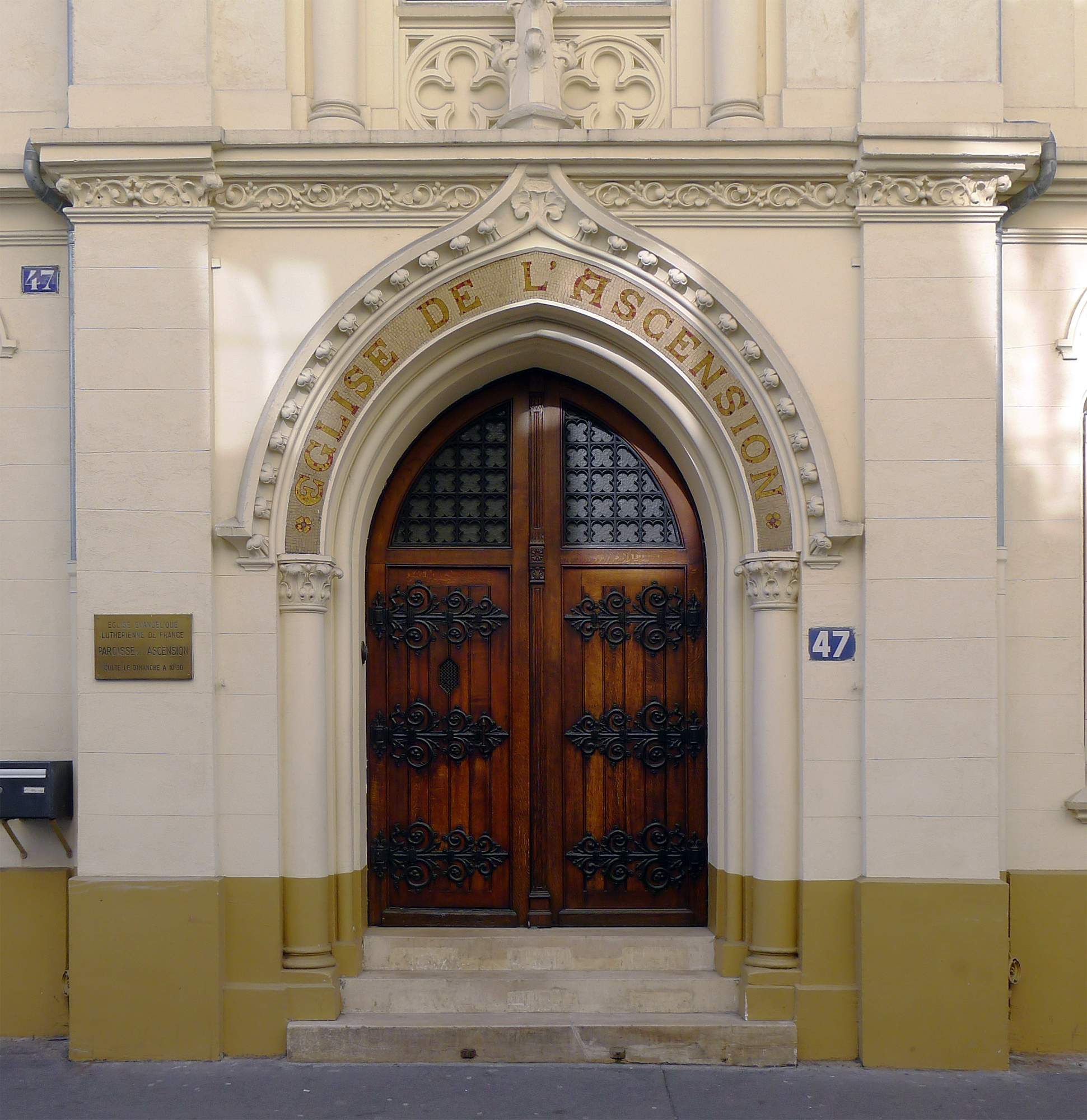 Eglise évangélique de l'ascension (47 rue Dulong, Paris XVII)